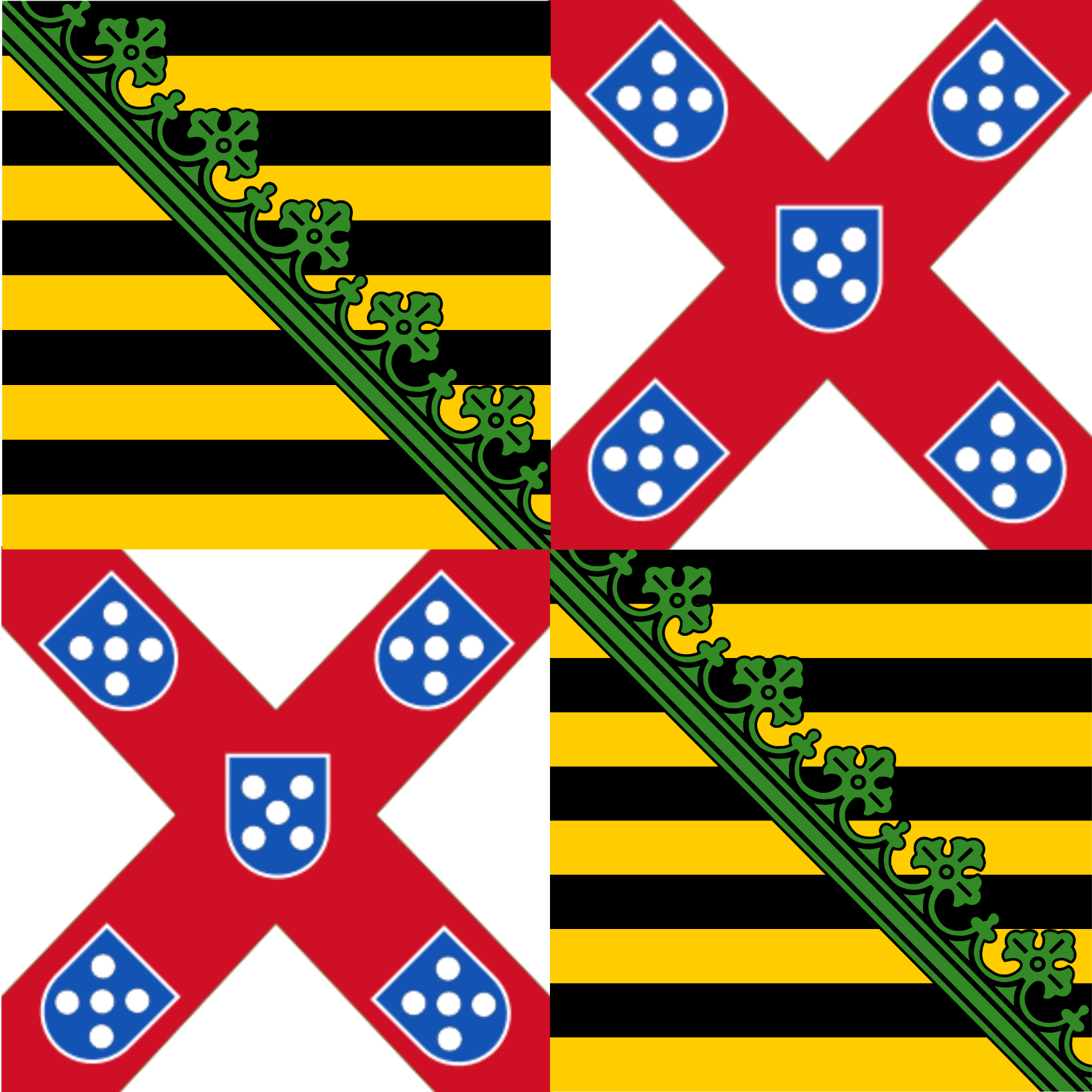 Suposto brasão de armas da Casa de Bragança-Wettin, sem qualquer fonte que confirme essa suposição